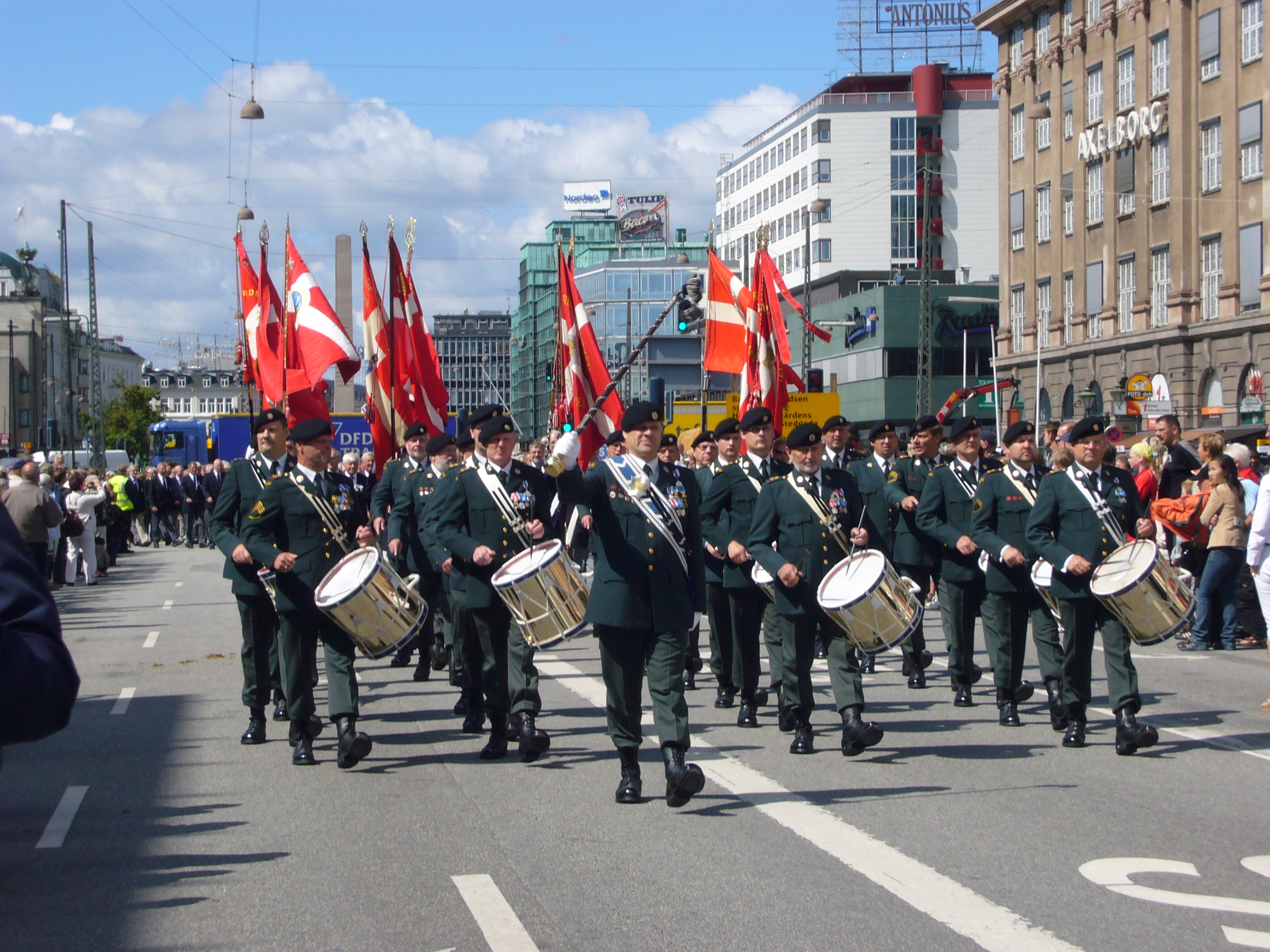 Livgardens Gamle Tambourer i march fra Tivoli til Livgardens Kaserne i Gothersgade den 30. juni 2008. Foruden tambourmajoren tæller styrken bagved 28 tambourer fordelt på 12 trommer og 16 fløjter.